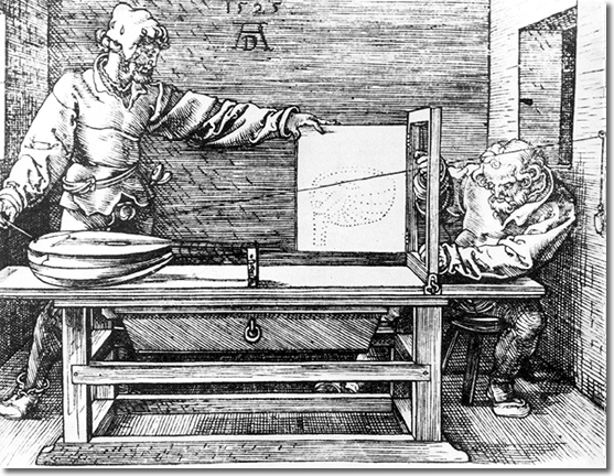 Procédé du portillon de Dürer. Report précis de cotes à l’aide d’un portillon qui se rabat. Ces points constitueront une vue perspective de l’objet depuis un point de vue.